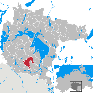 Bollewick in Mecklenburg-Western Pomerania - District Müritz